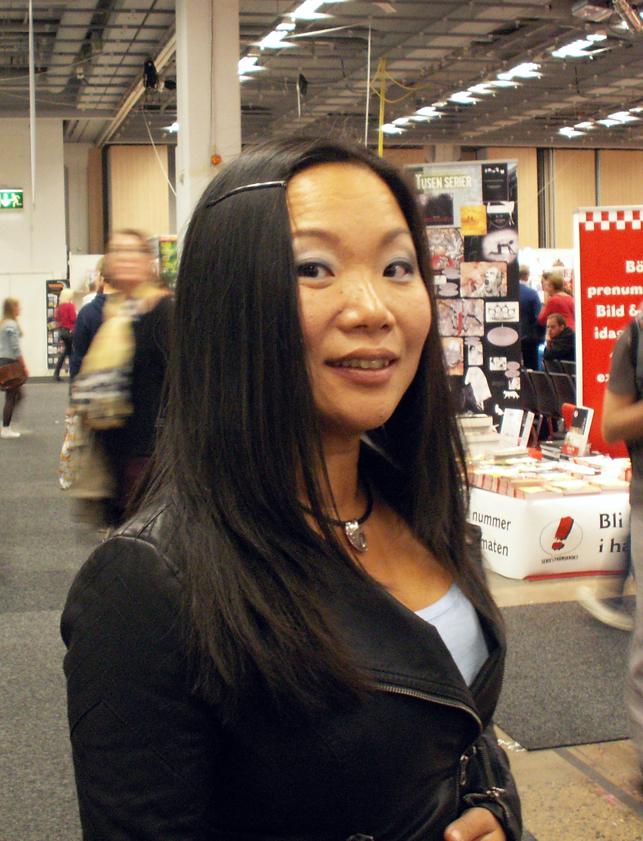 Maria Cronstam, serieförfattare och medskapare av den tecknade serien Elvis.